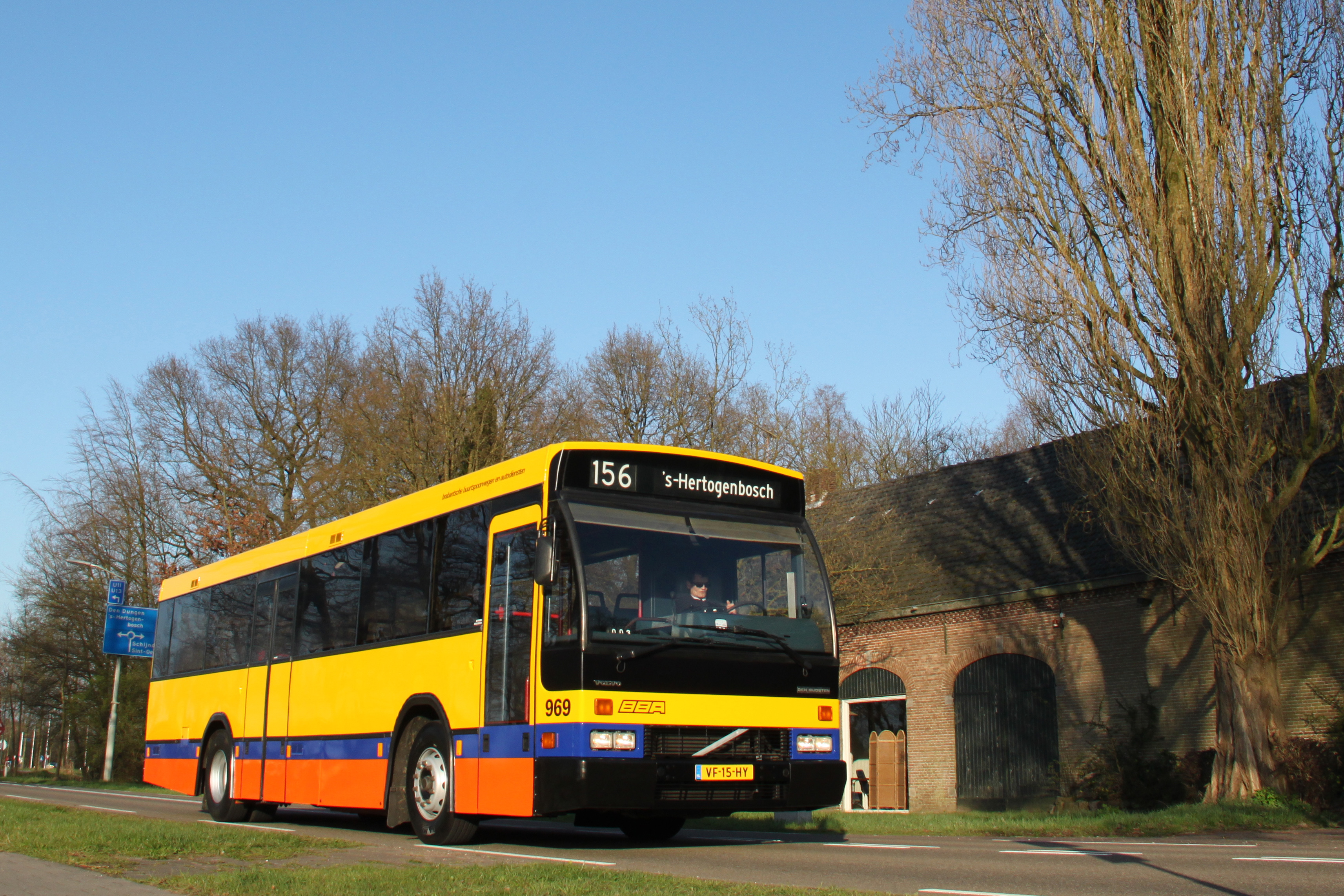 Den Oudsten B88 / Volvo B10M-55 als museumbus (particulier bezit) tijdens een excursie van de Stichting Veteraan Autobussen, Werkgroep Brabant op de Gestelseweg nabij Sint-Michielsgestel.